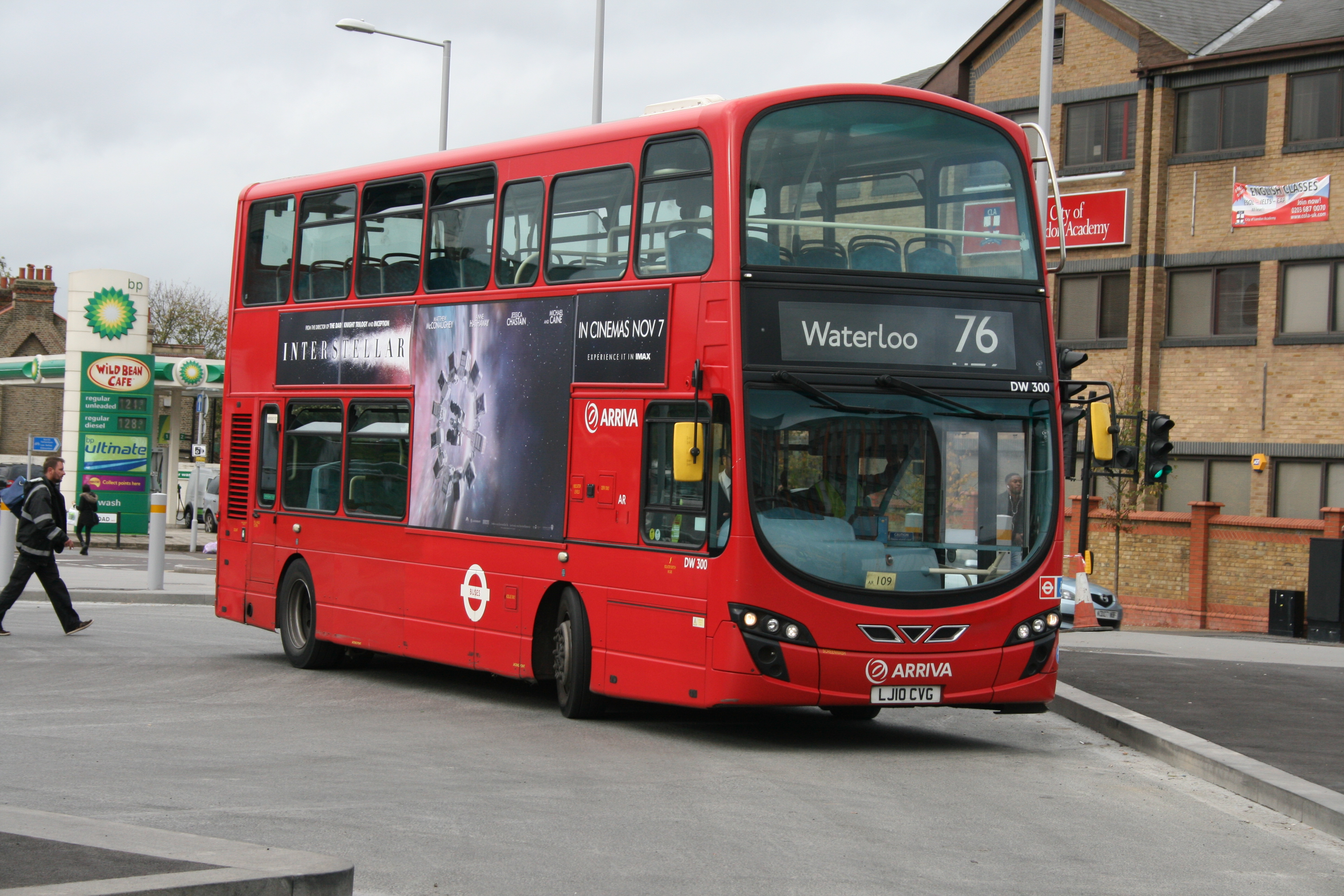 LJ10 CVG